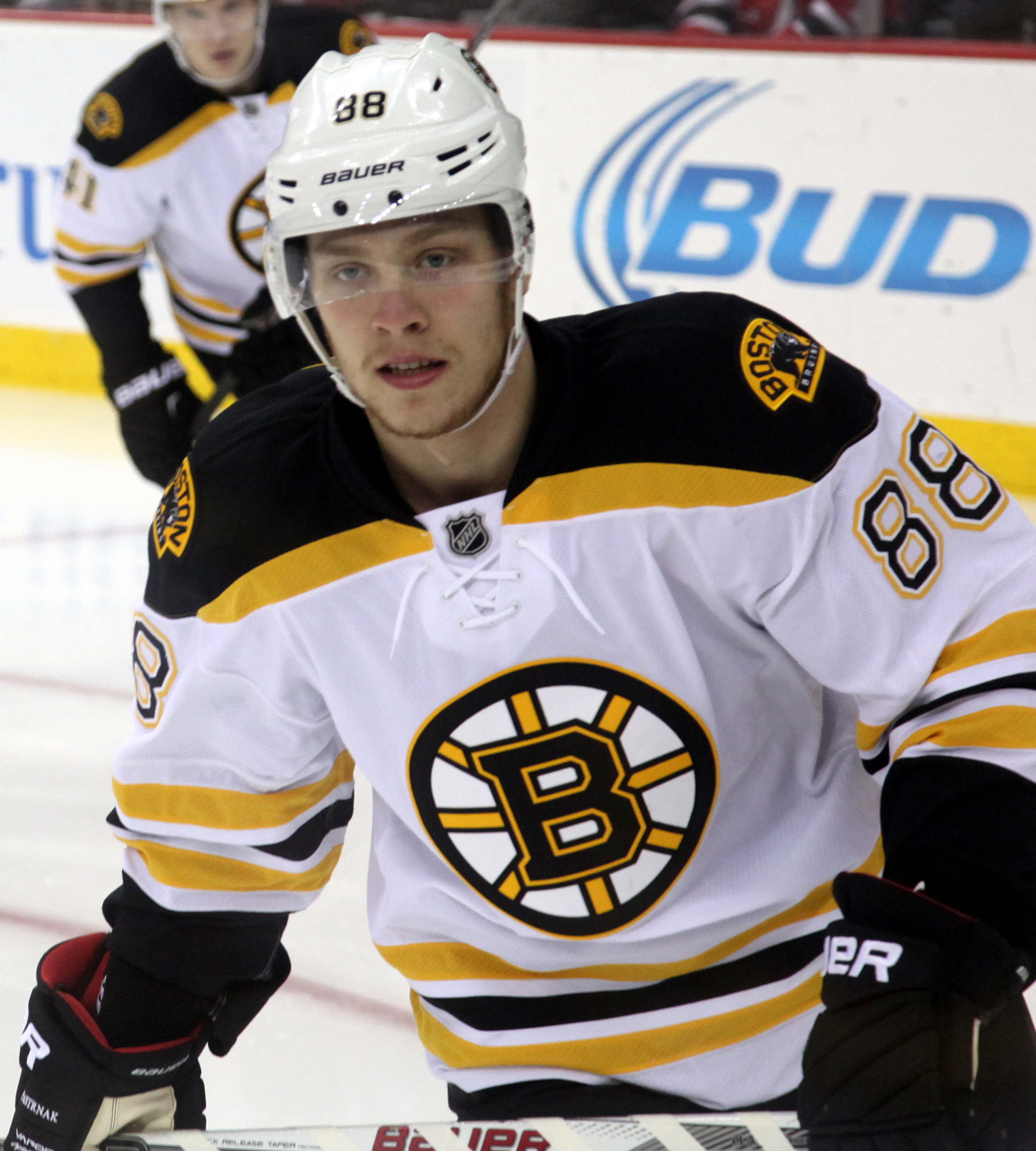 Pastrnak in January 2016.